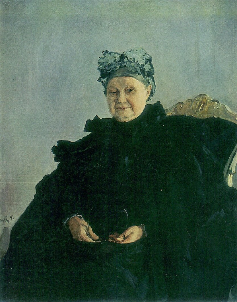 Серов Валентин Александрович. Портрет Морозовой М.Ф. Год: 1897. Размер: 108 × 87,5 Стиль: Реализм. Место хранения: Государственный Русский Музей.